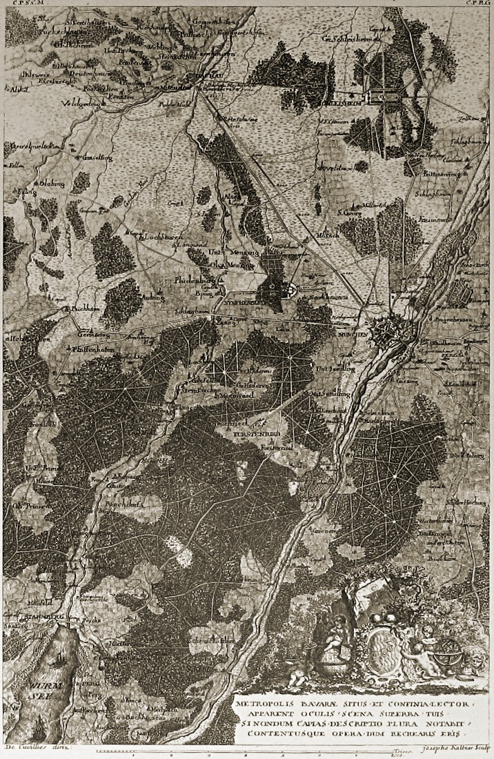 Karte des Gebietes des kurfürstlichen „Hirschjagdparks“ im Westen Münchens, angefertigt von François de Cuvilliés.